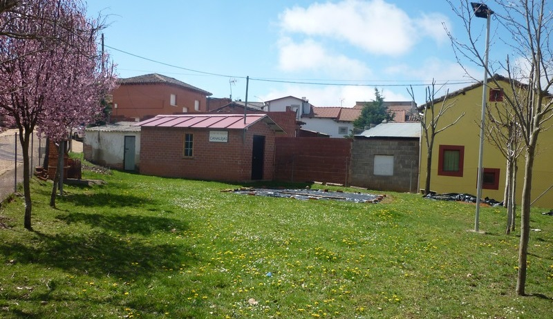 Bolera Canalejas